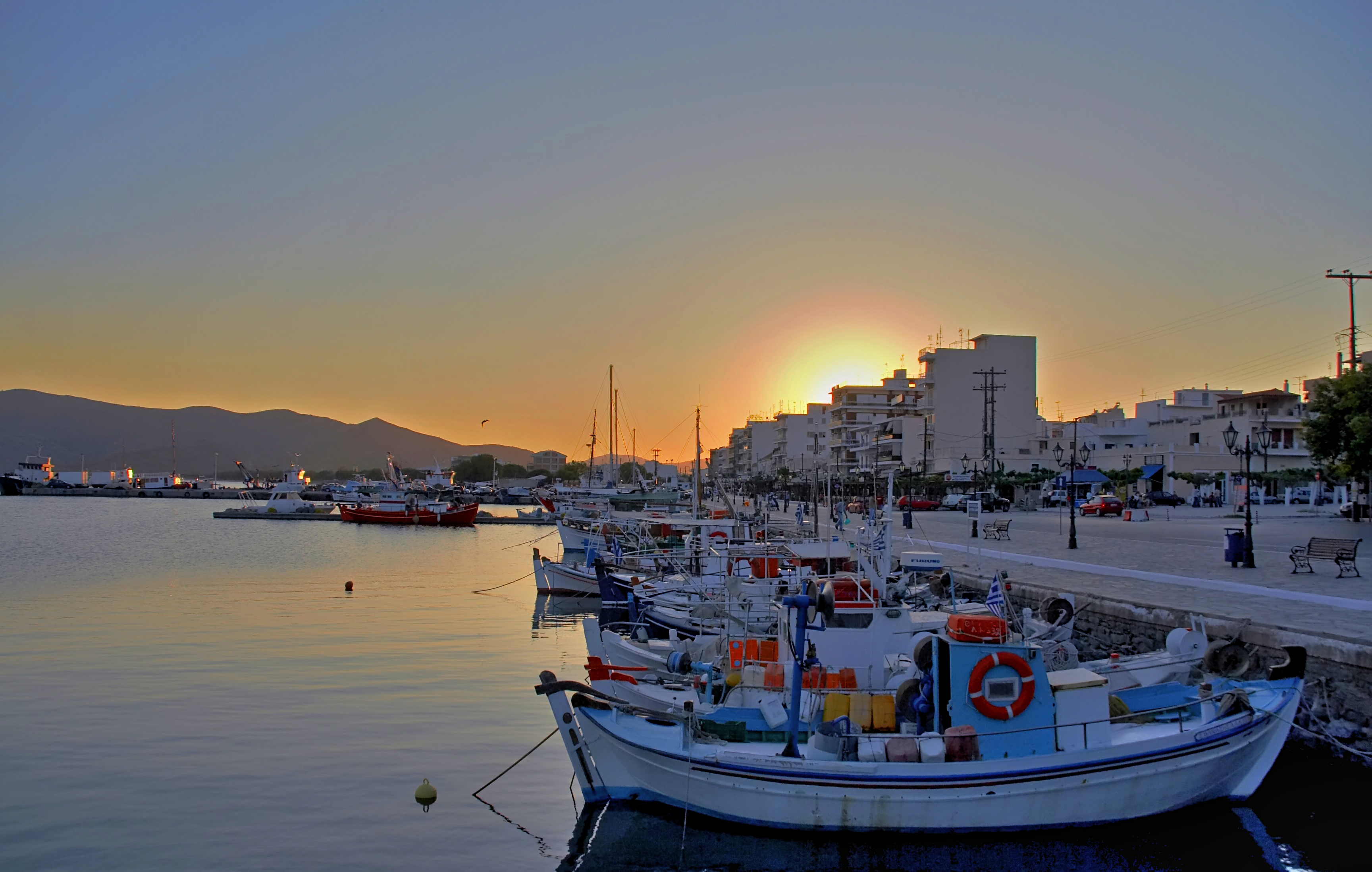 limani karistou